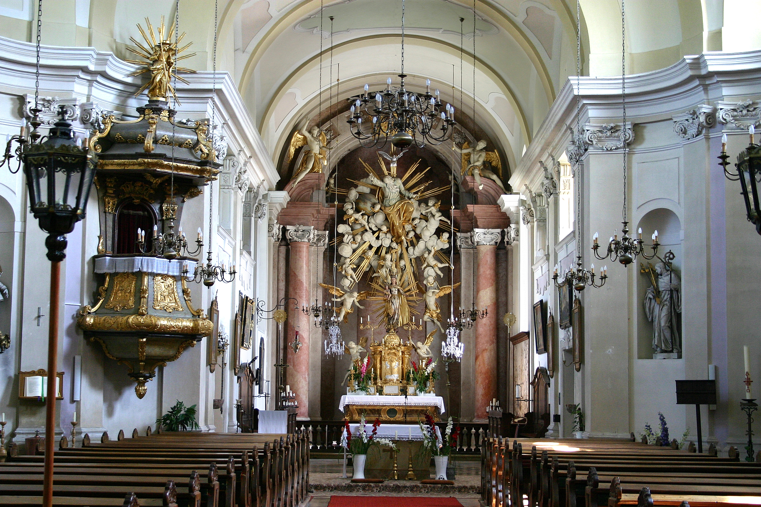 Höflein an der Hohen Wand Wallfahrtskirche Maria Kirchbüchl (Bild 2)